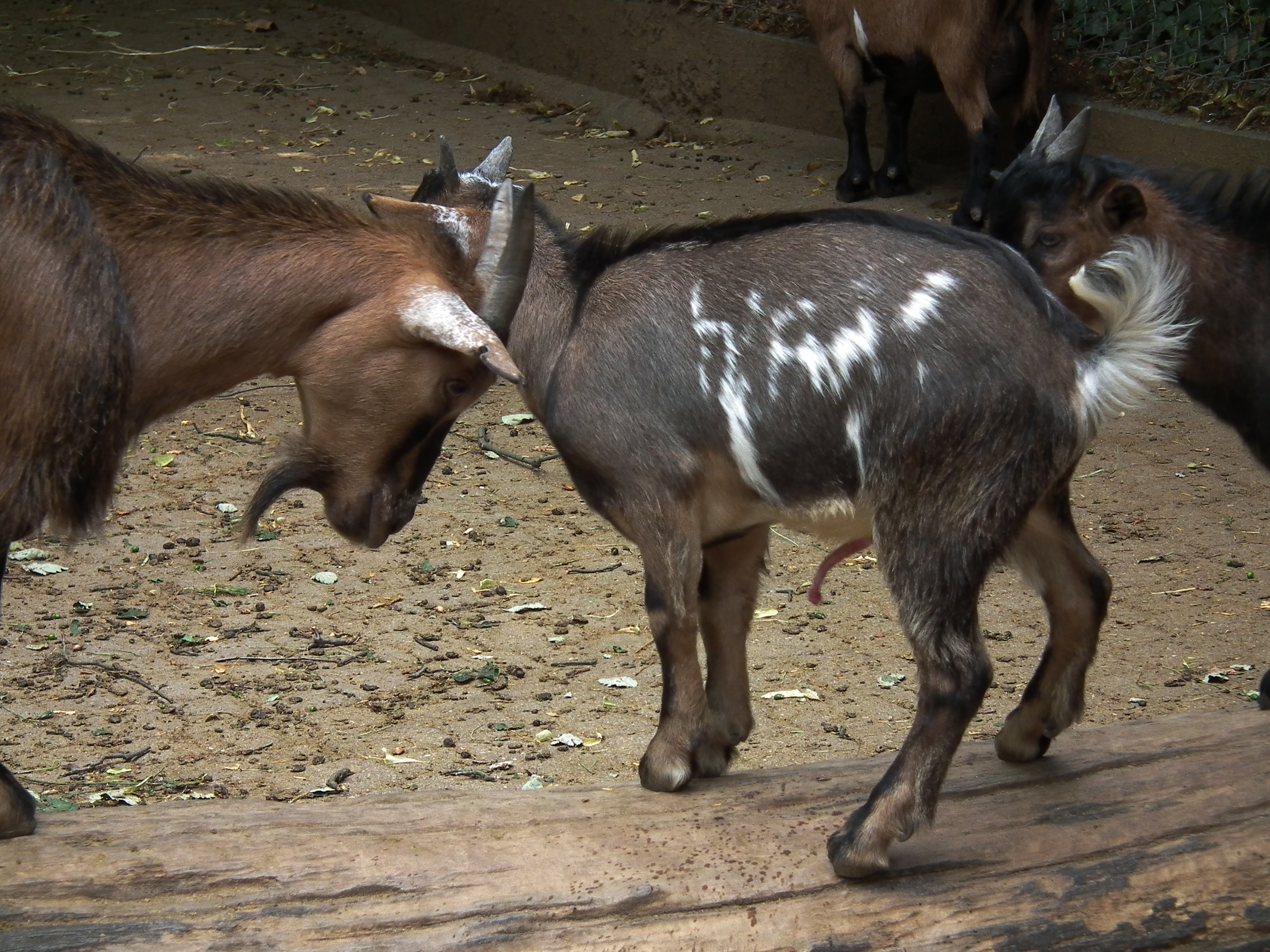 Afrikanische Zwergziegen im Streichelgehege des Zoo Landau (Rheinland-Pfalz, Deutschland)